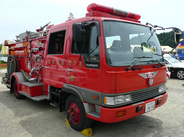 水戸市消防本部のポンプ車